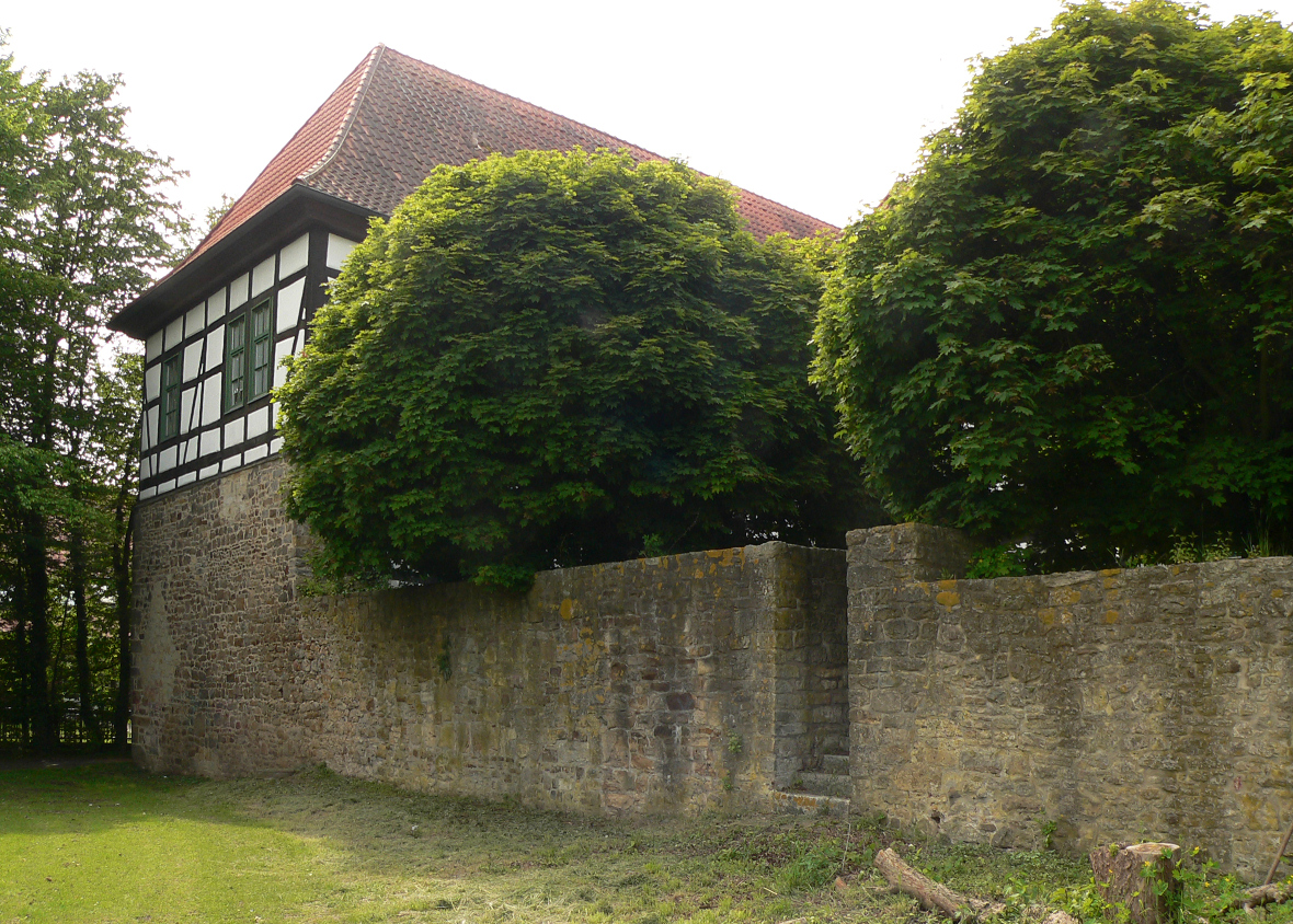 Rückseite des Rathauses von Rehburg-Loccum in Rehburg mit Mauerresten der Burg Rehburg, darauf Fachwerkbau aus dem 18. Jahrhundert